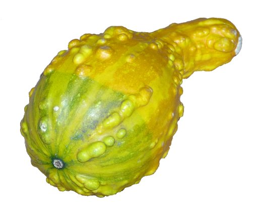 Cucurbitaceae, Cucurbita pepo pl: Tykwa